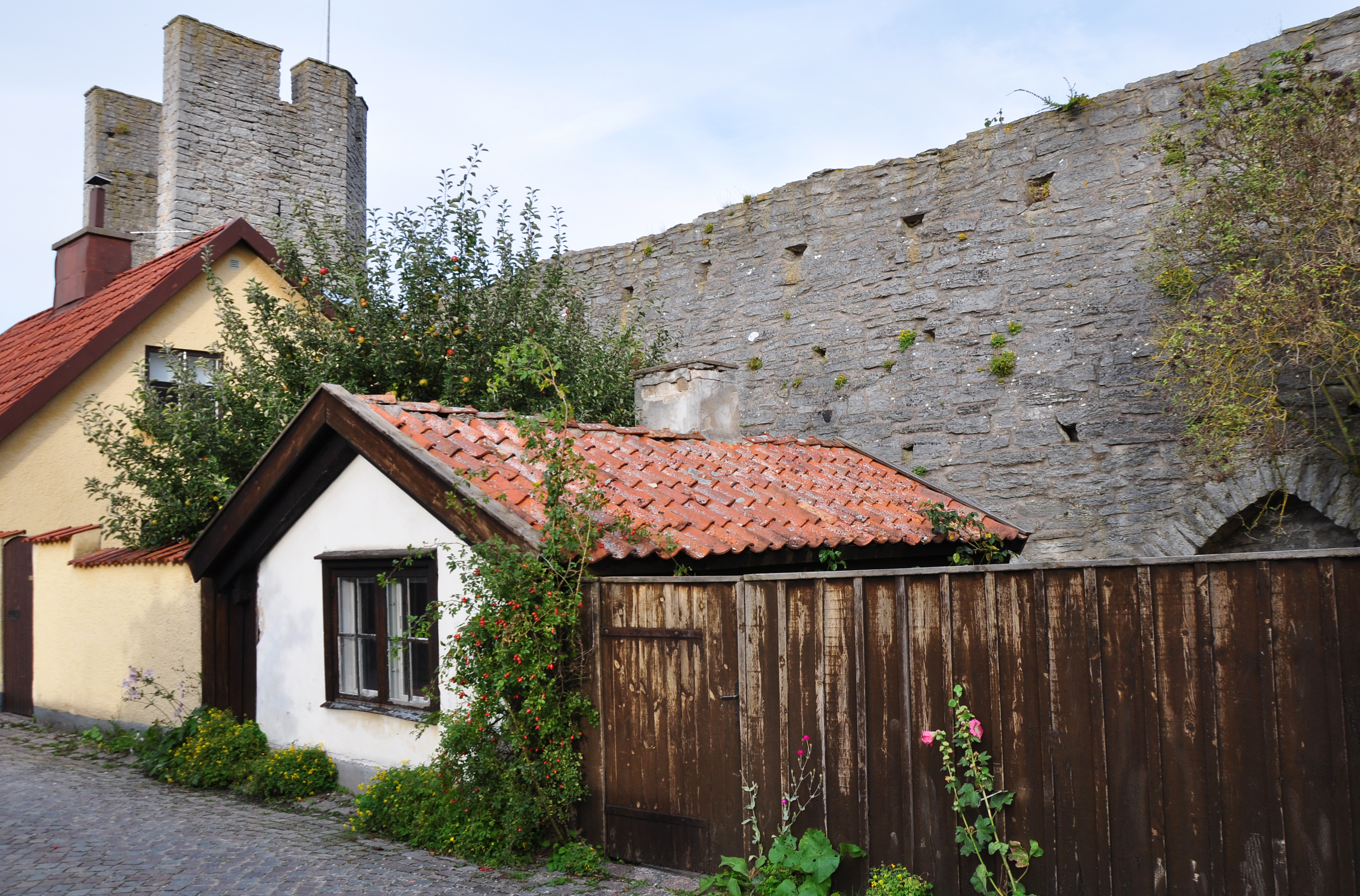 Visby Muren 13, STADENS MINSTA HUS, 21300000013976